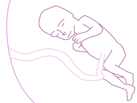 Ventitreesima settimana di gravidanza